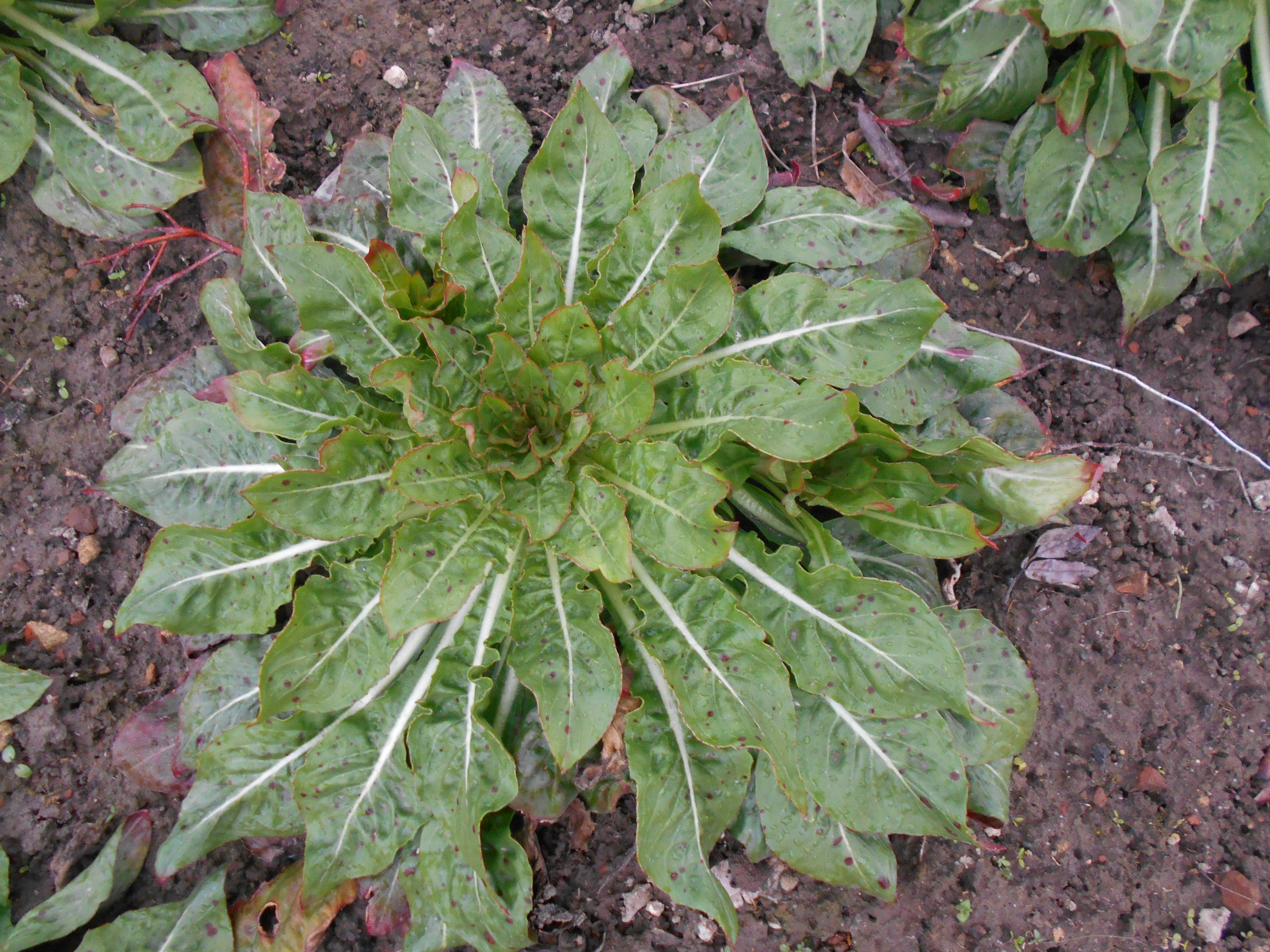 Wiesiołek dwuletni (Oenothera biennis), Ogród Botaniczny UMCS w Lublinie.